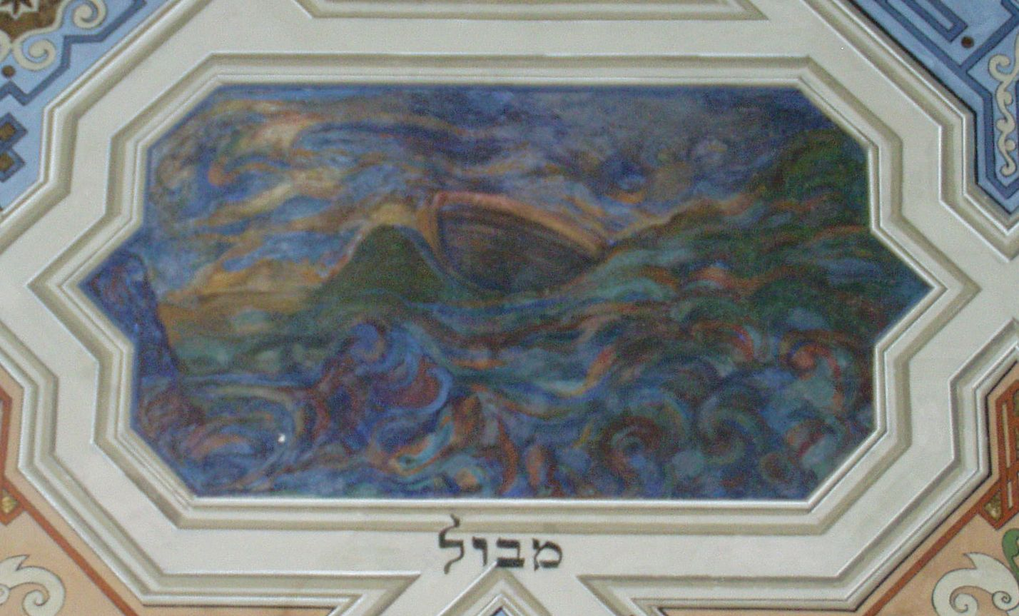 Sceny biblijne na stropie synagogi Kupa w Krakowie